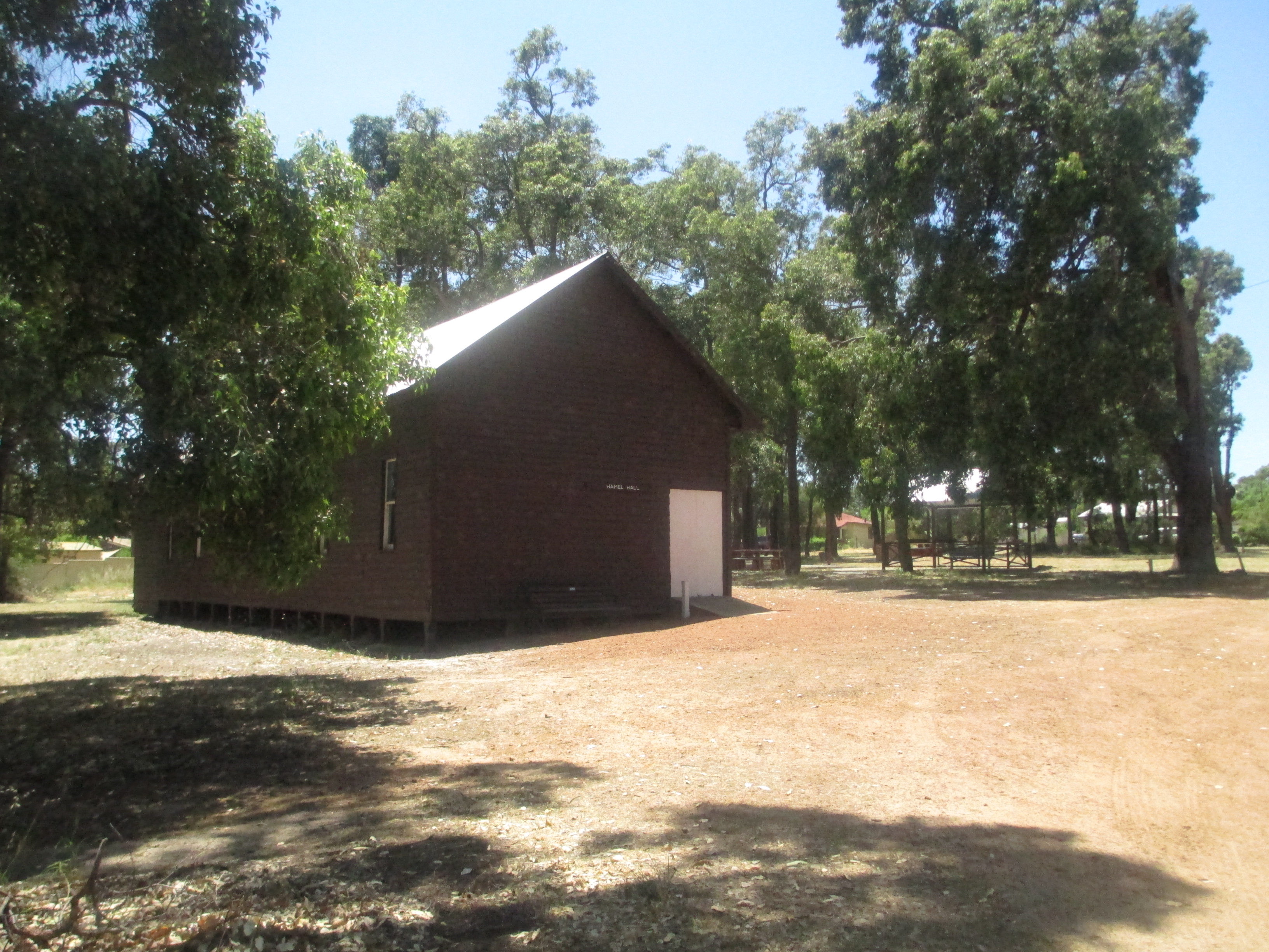 From Wikipedia Takes Waroona Hamel Hall